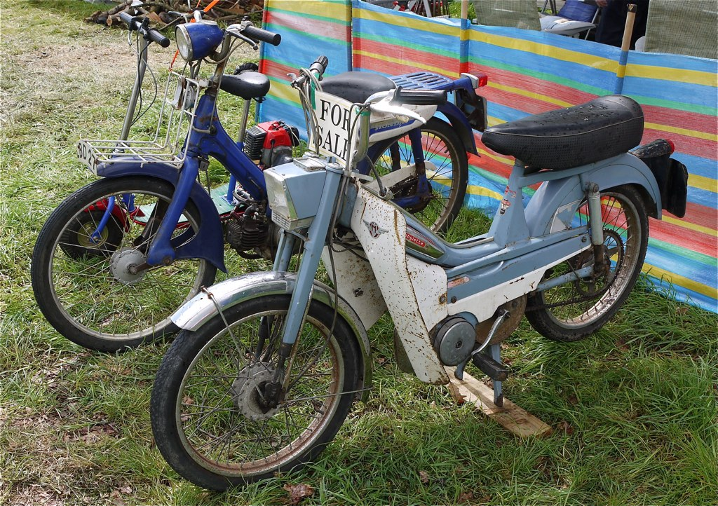 Panasonic G1 14-45 Lens